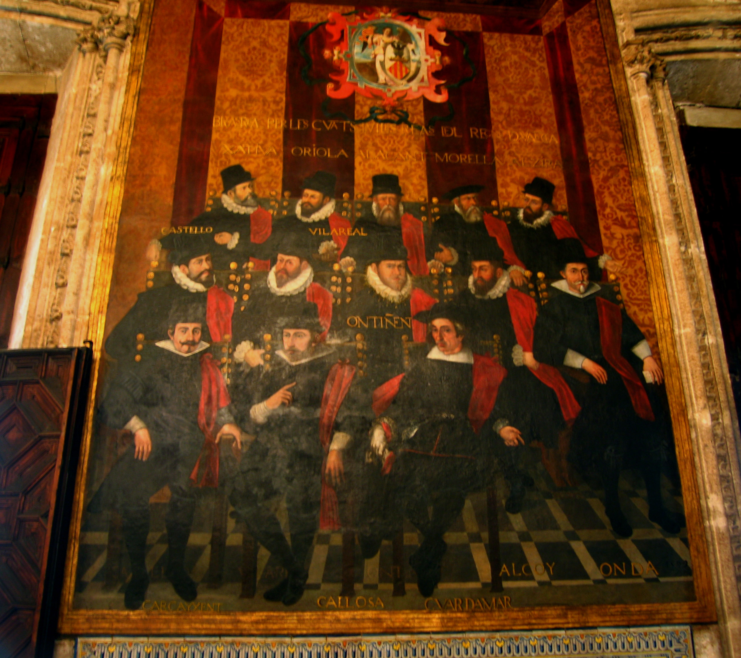 Sala de Corts de la Generalitat Valenciana